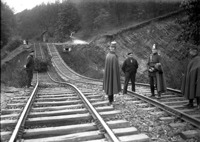 Die grosse Erdrutsch-Katastrophe in Vienenburg! Der Schaden geht in die Millionen Mark. Die zerstörte Eisenbahnstrecke in Vienenburg. Die Gleise hängen 70 mtr. über einen Krater.